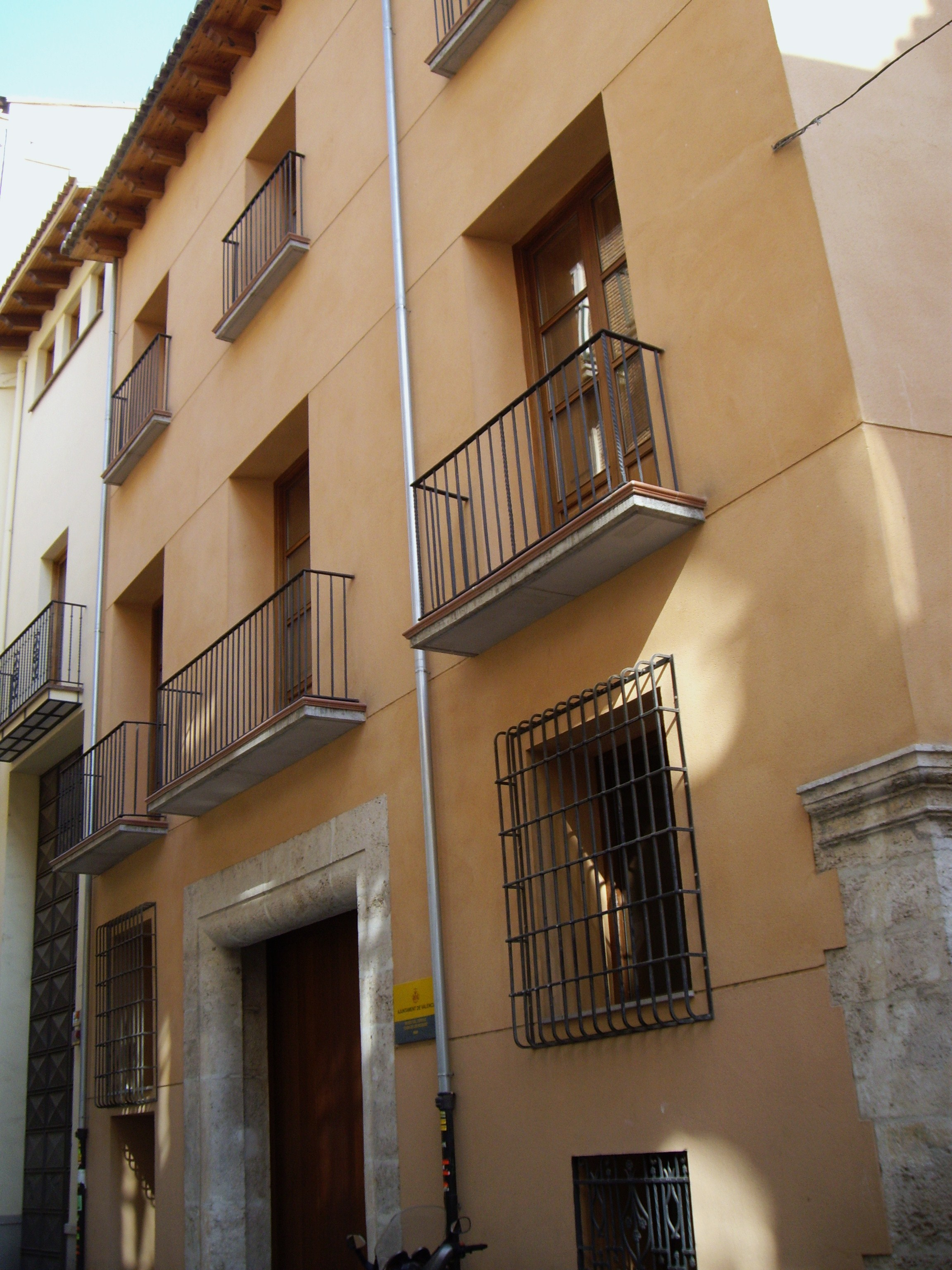 Exterior de la casa de les Roques, València.